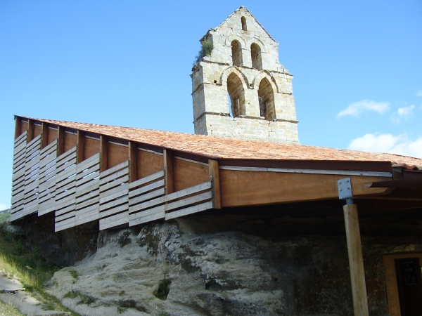 Santa María de Valverde - Valderredible RPLl - GyR - Agosto de 2006